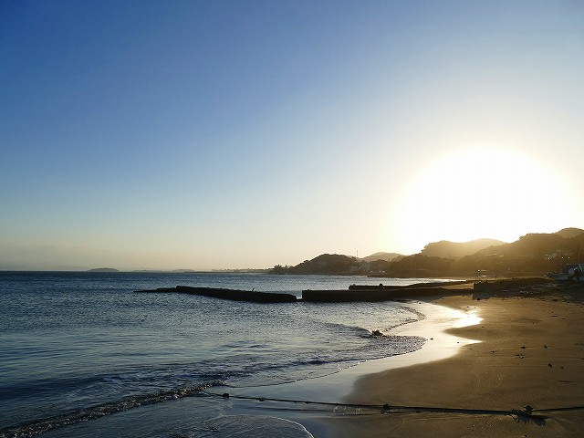 見物漁港から見た日の出。千葉県館山市見物〔けんぶつ〕。見物堤防の上から撮影。撮影者のブログはこちら。地図はこちら。